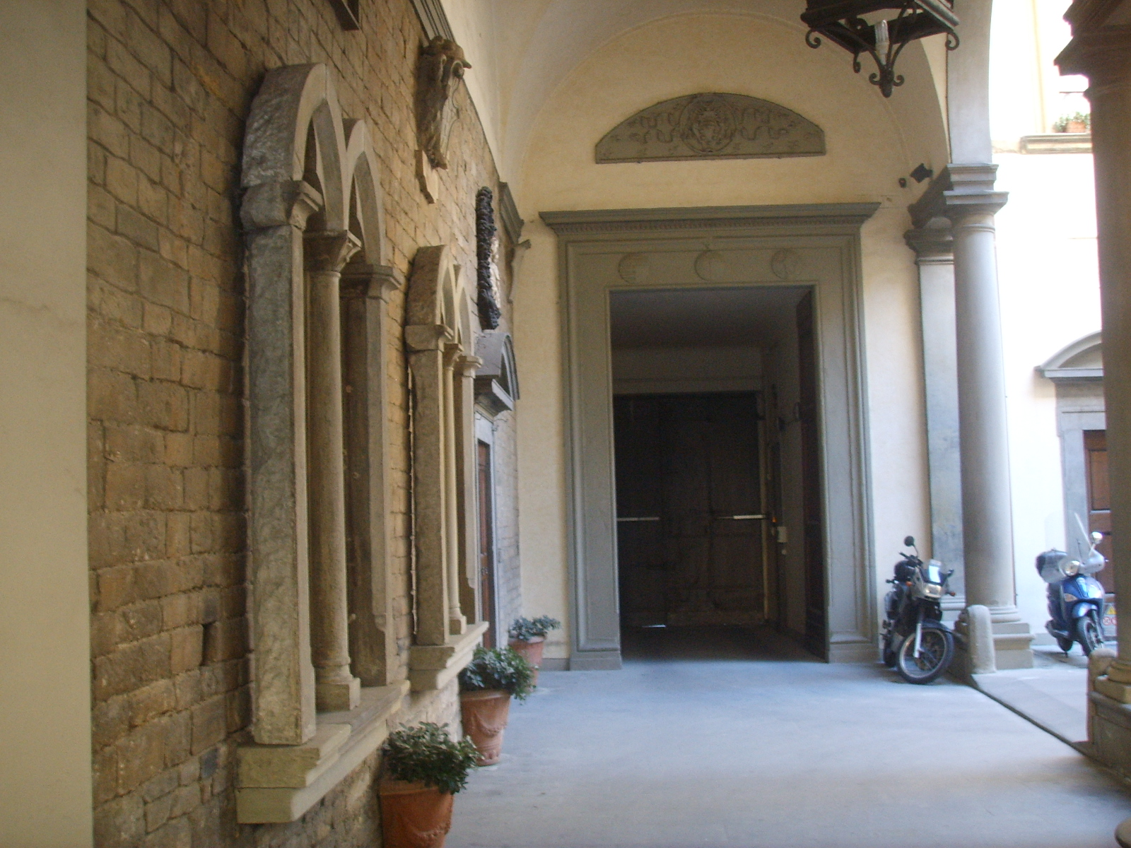 Palazzo_arcivescovile,_cortile